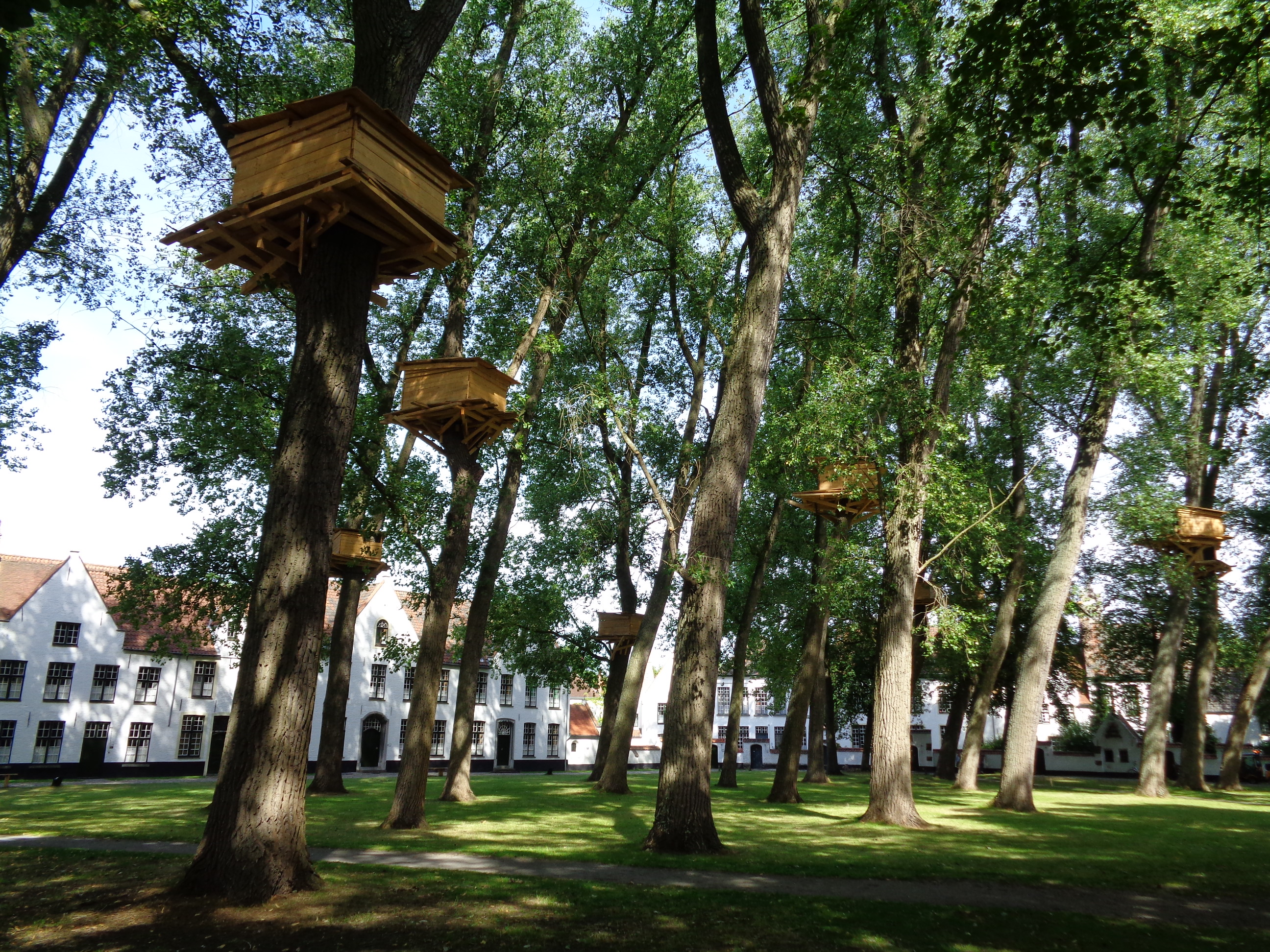 Cabanes dans les arbres du parc du beguinage de Bruges en 2015